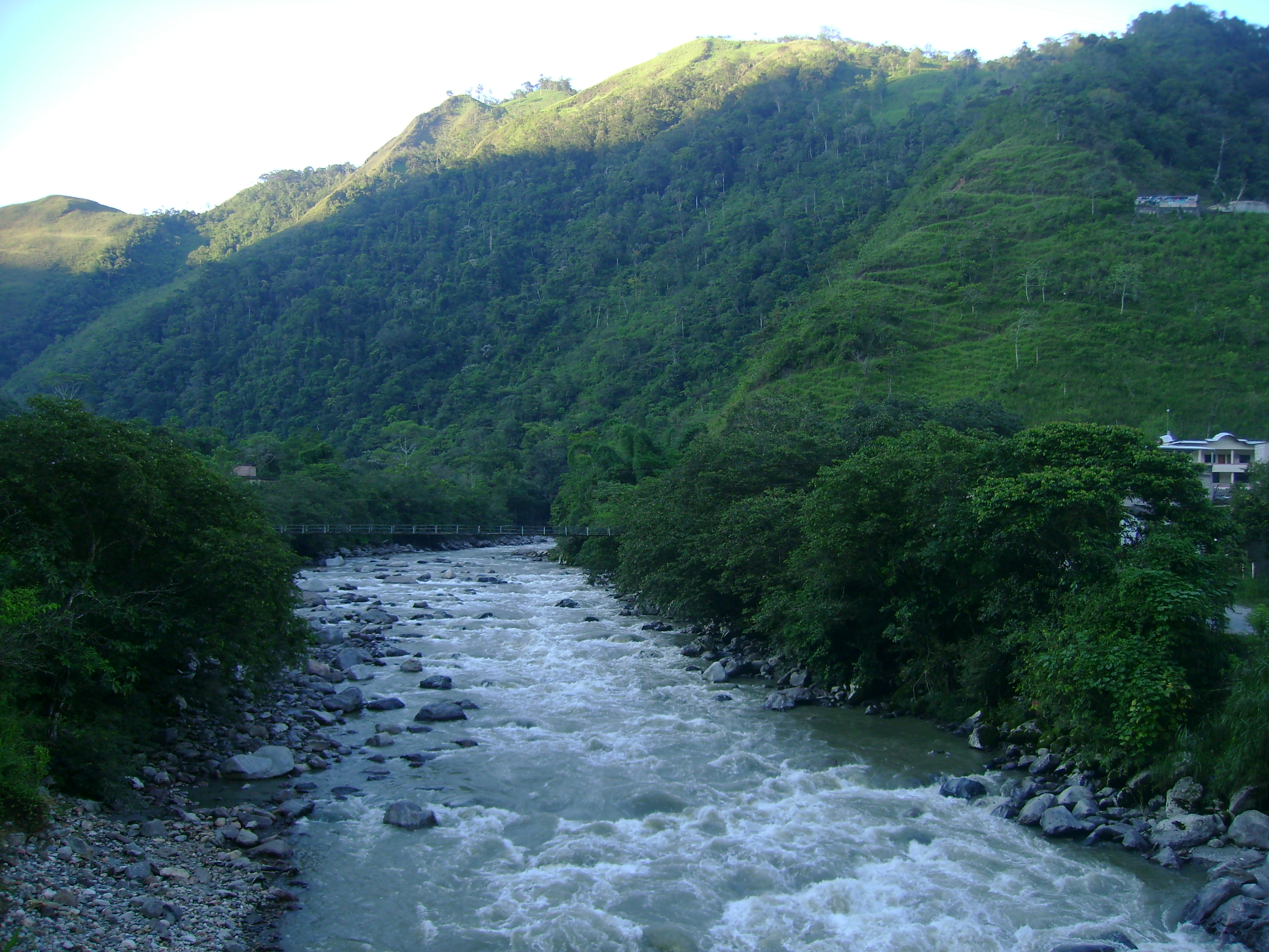 Está es una fotografía autentica del Río Zamora, en la ciudad de su mismo nombre, fue tomada el 17 de septiembre de 2010. Esta fotografía es propiedad exclusiva de AndFer PRODUCCIONES y Andrea Valencia su propietaria.